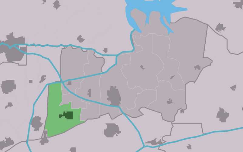 Kaartsje fan himrik fan Kollumersweach